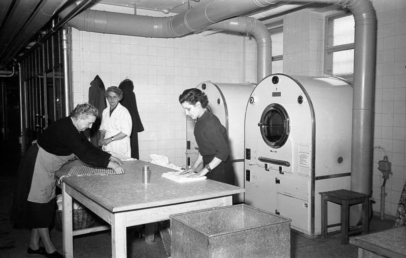 1954/1955 Modernes Kinderheim in Lankwitz (Ernst Reuter Siedlung), West-Berlin